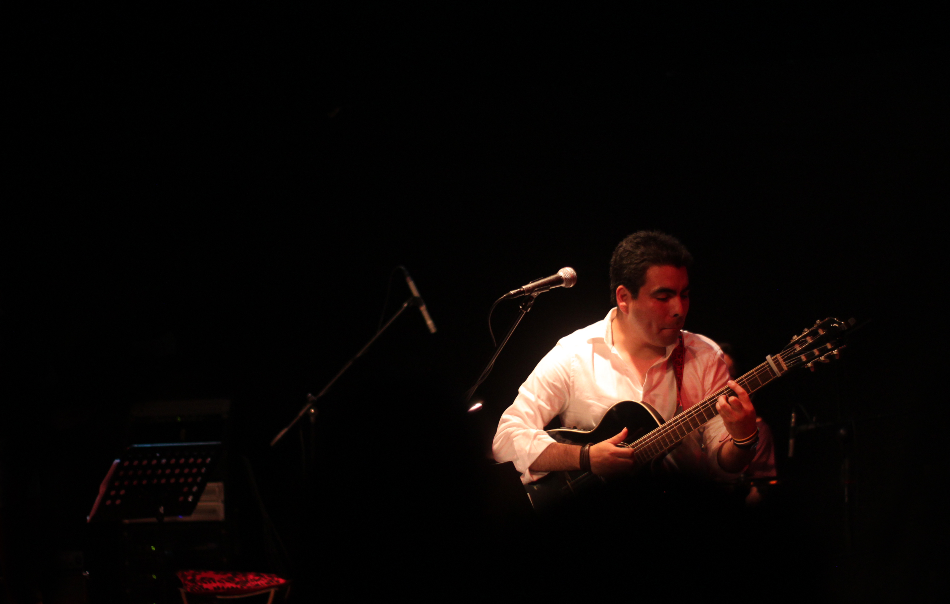 Juan Zamorano en concierto lanzamiento disco Majamama Sala Master Radio Universidad de Chile